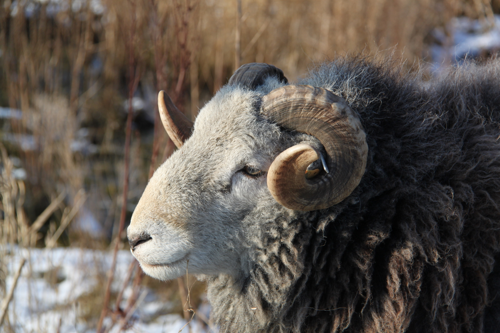 Westerplas